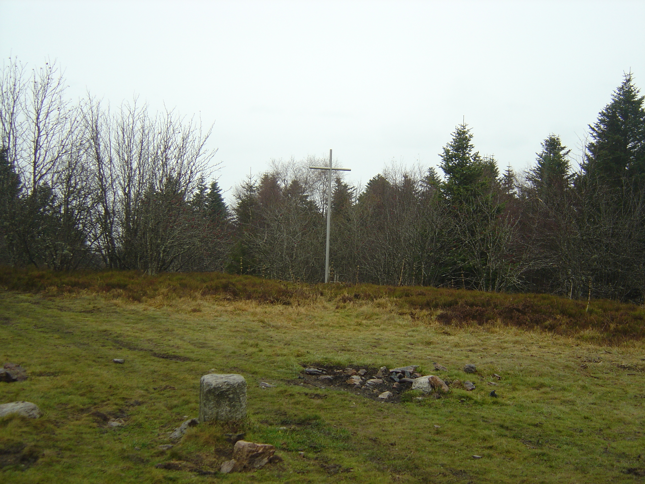 Croix et borne géodésique au sommet du Puy de Montoncel. Les arbres n'offrent pas de point de vue